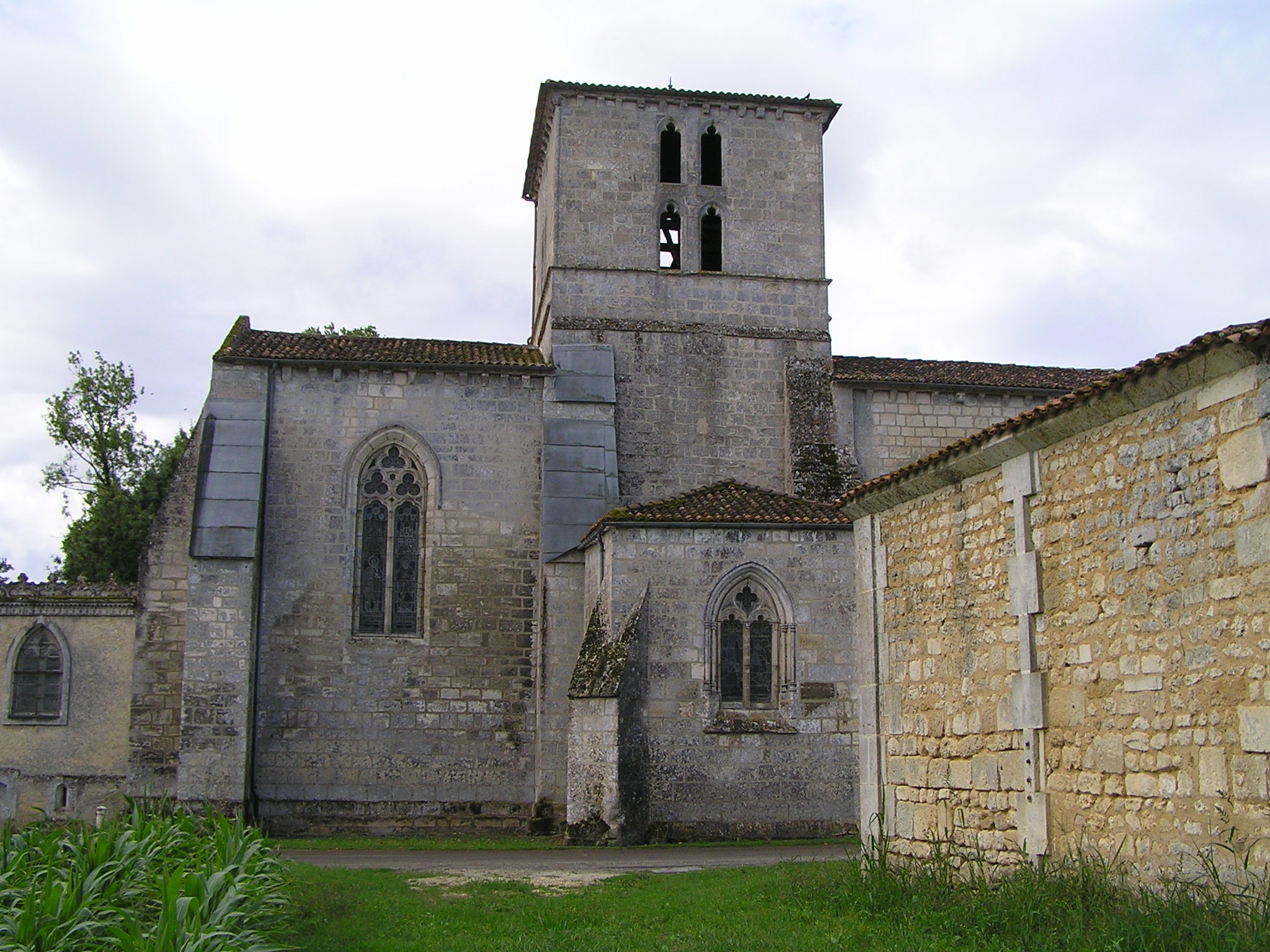 église d'Angeac-Charente, Charente, France